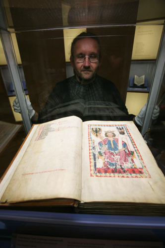 Dr. Armin Schlechter, Leiter der Handschriftenabteilung der Uni-Bibliothek Heidelberg, betrachtet den Codex Manesse in der Ausstellung Heiliges Römisches Reich Deutscher Nation